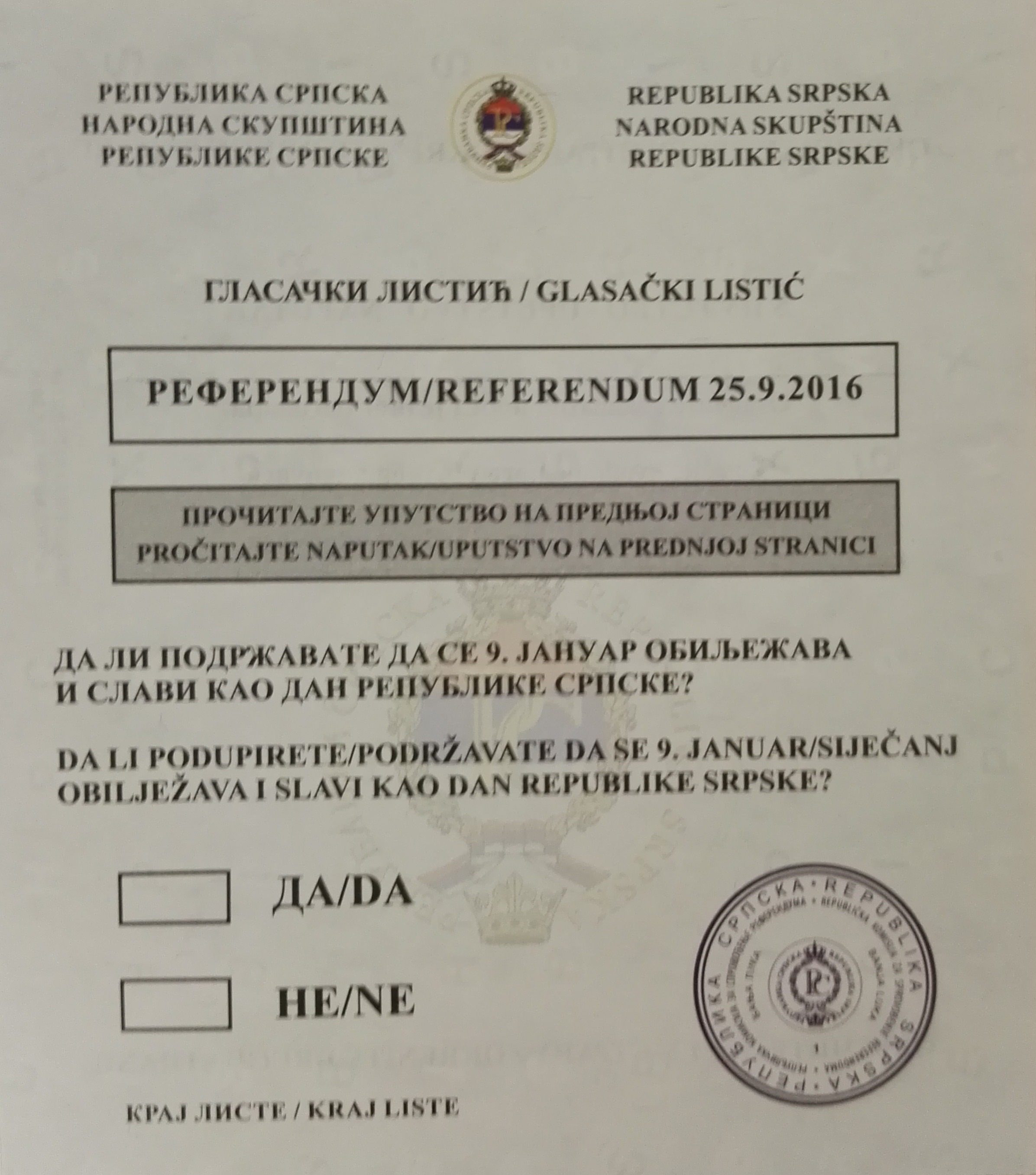 Wahlzettel zum Referendum in der Republika Srpska 2016 über den Nationalfeiertag (Vorderseite)